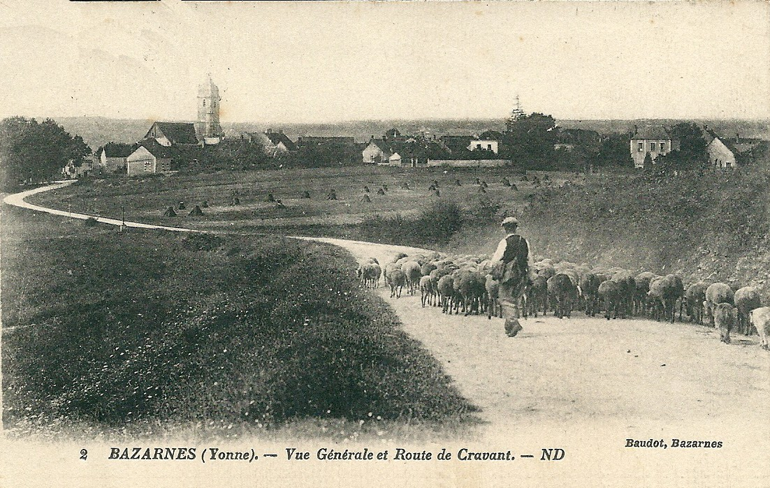 Bazarnes (Yonne) - Vue générale ; route de Cravant - vers 1925